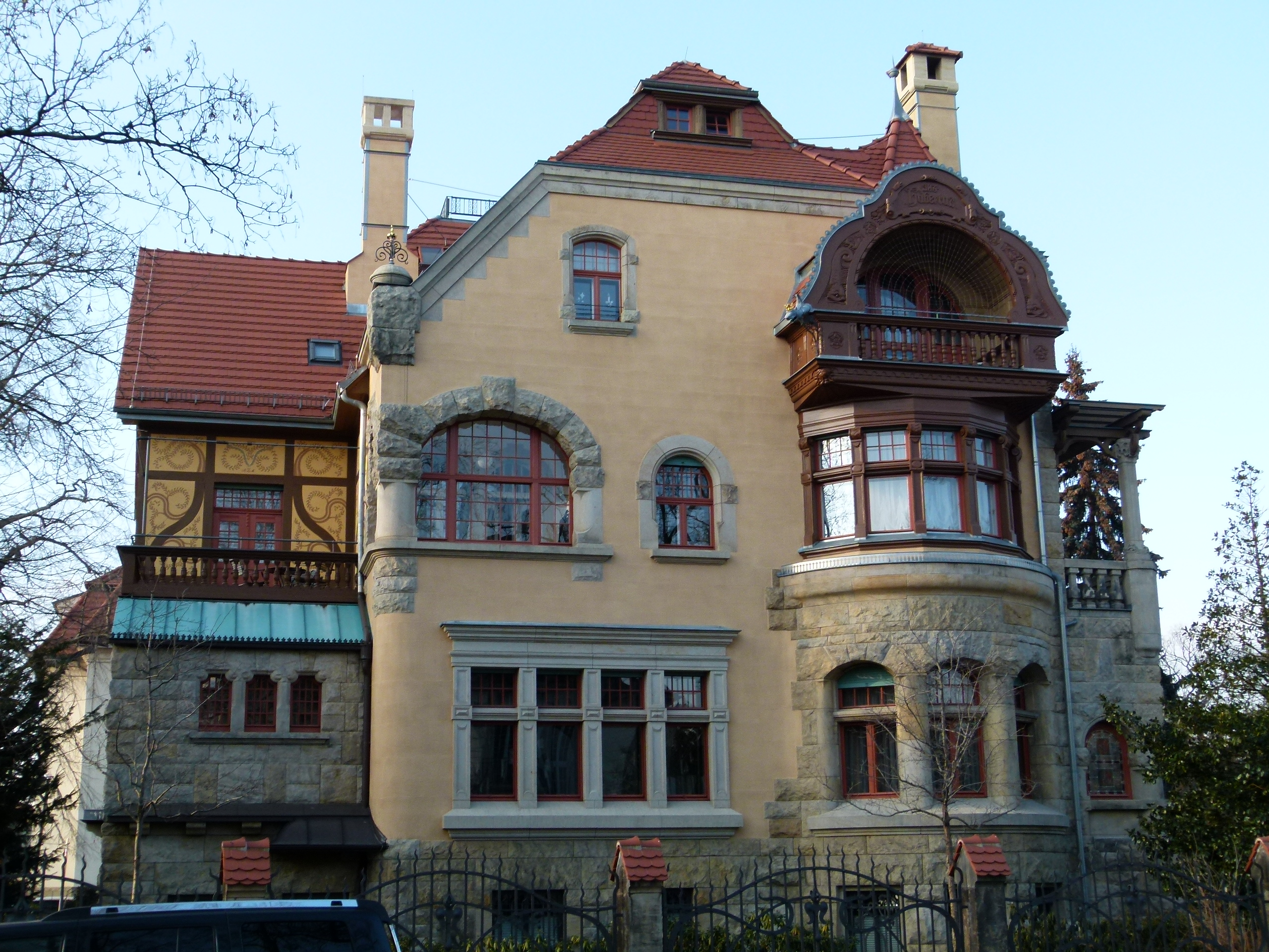 Denkmalgeschütztes Haus, Tiergartenstraße 52, Strehlen, Dresden